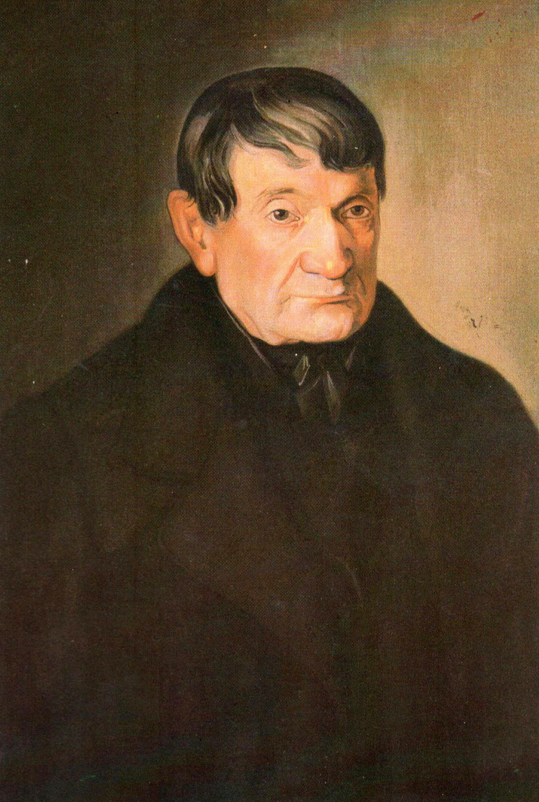 Фотографија портрета Јоакима Вујића, уље на платну Димитрија Аврамовић (1845.) пренето са сајта:Овде